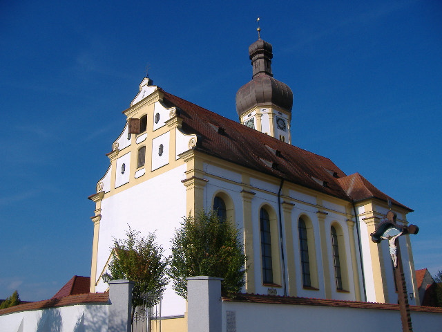 Schwenningen ander Donau